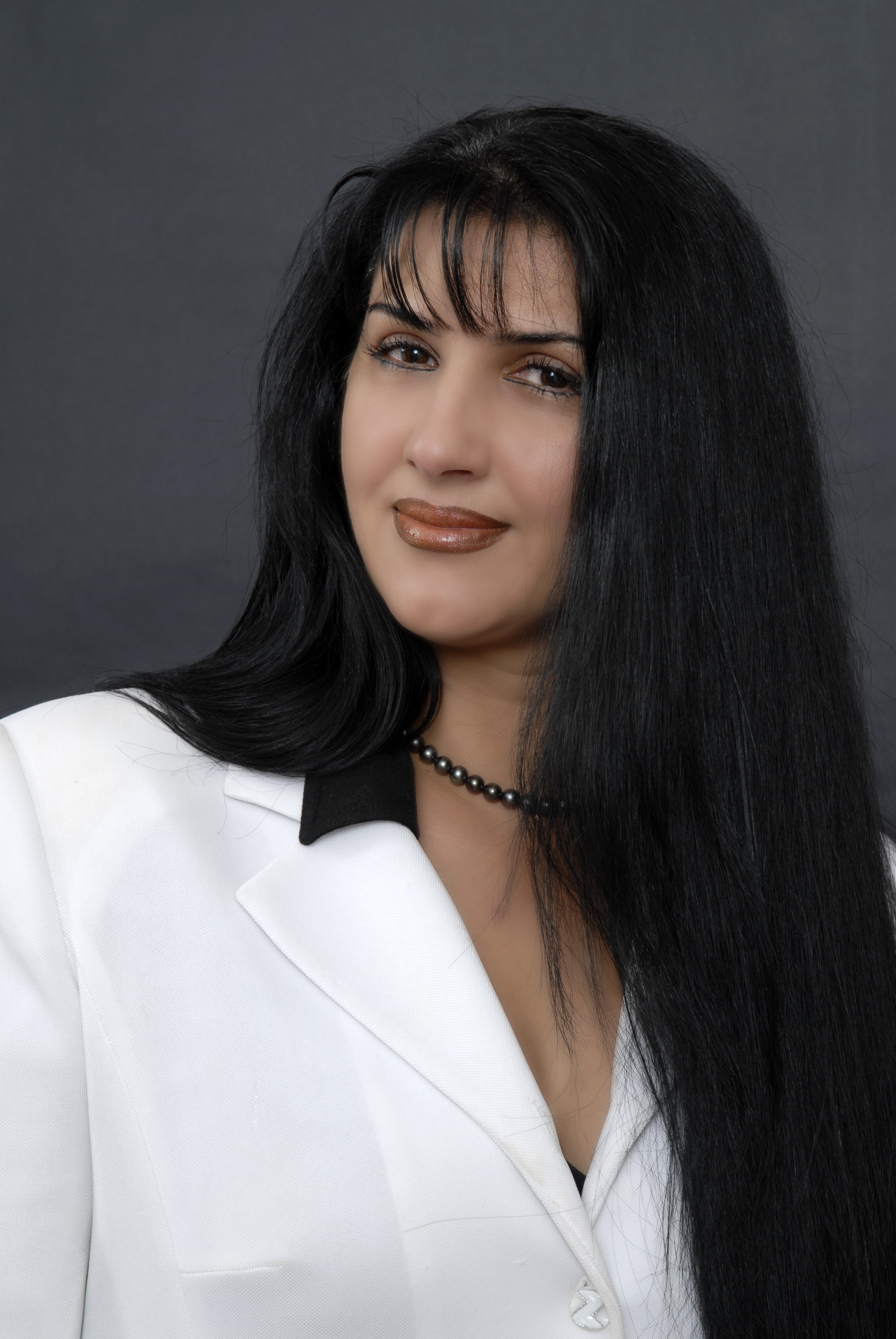 Interlingua: Nourida Gadirova Ateshi